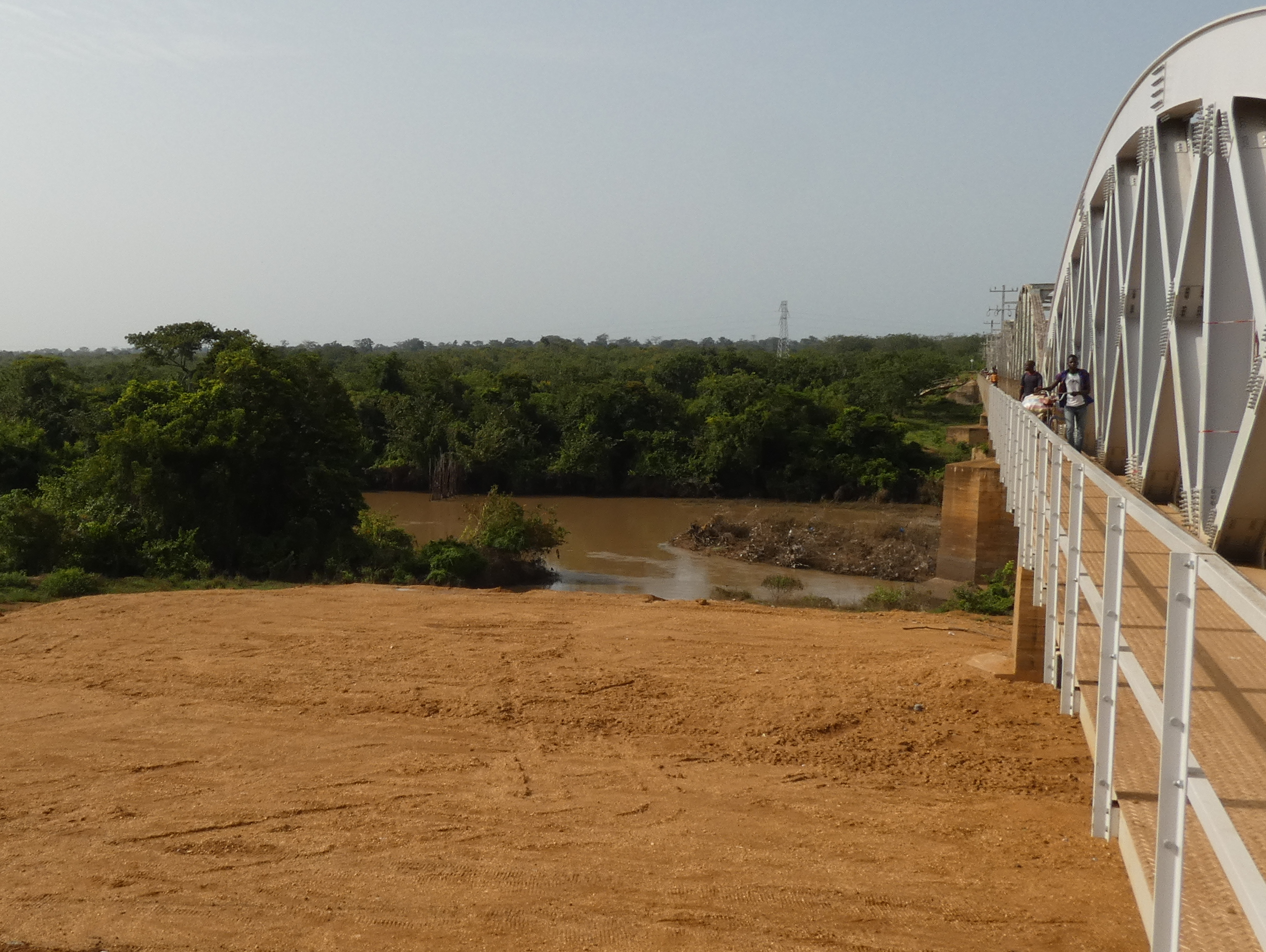 der N'Zi bei Dimbokro